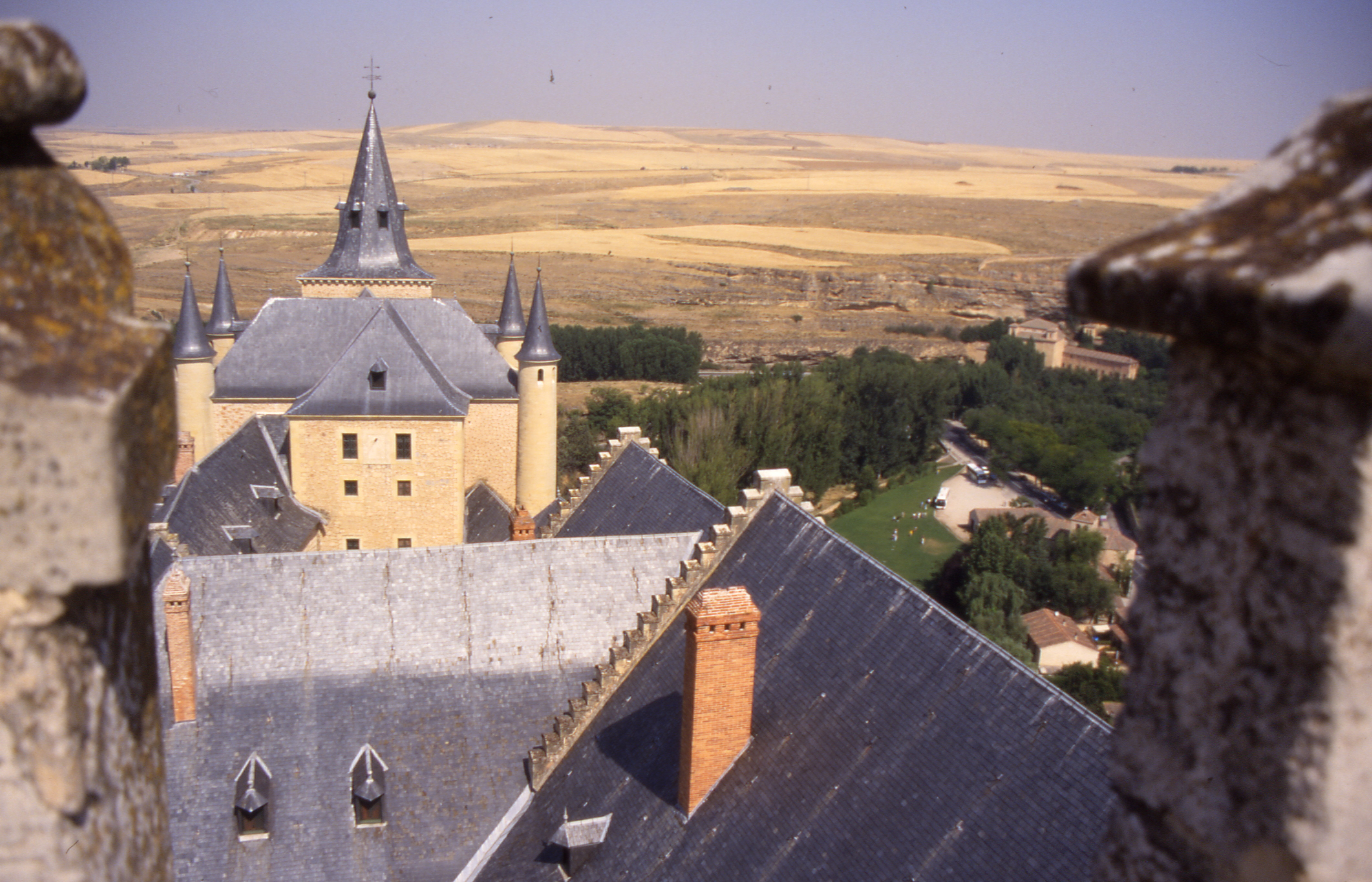 Segovia Blick vom Alcacar